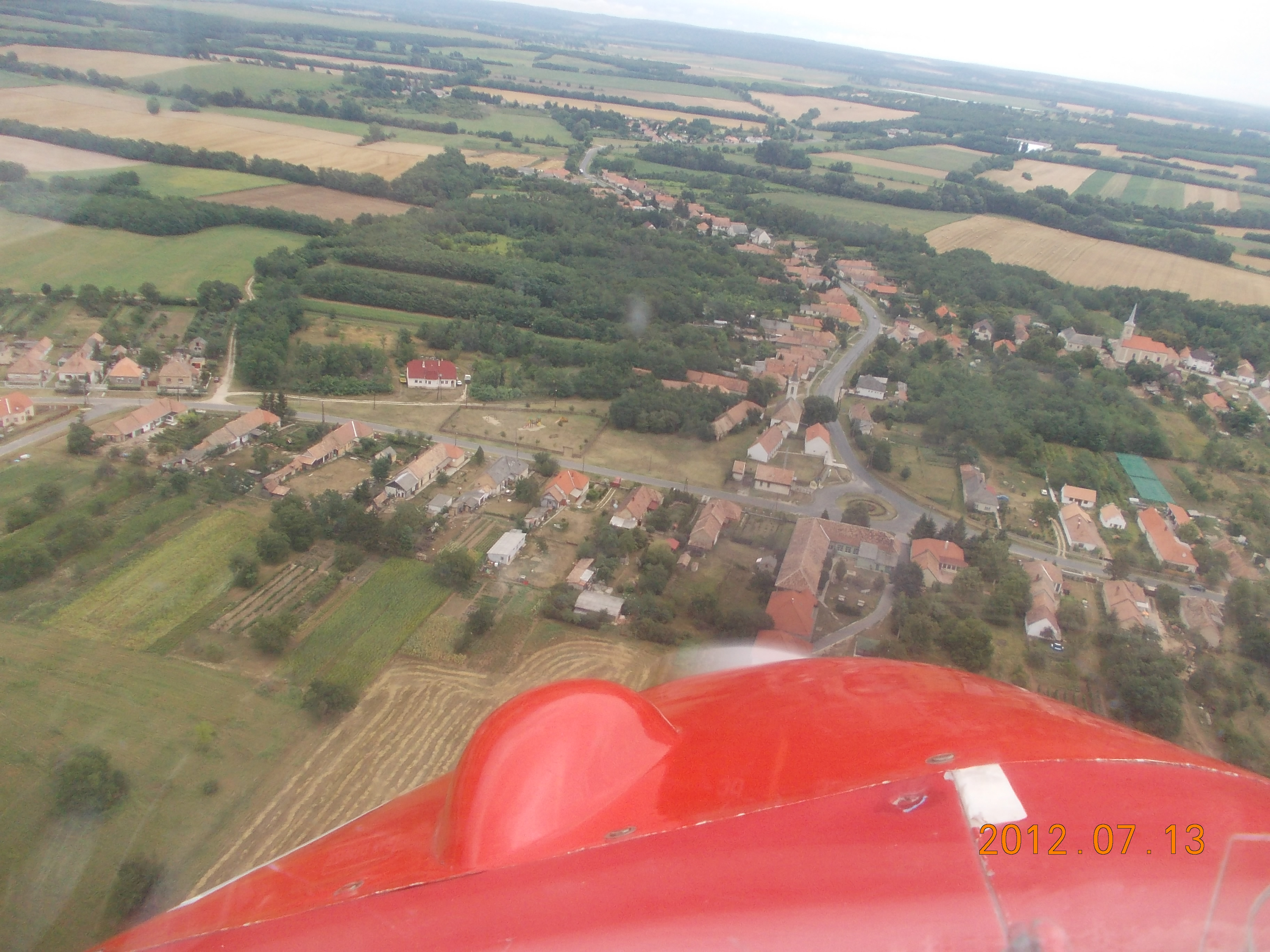 Vanyola